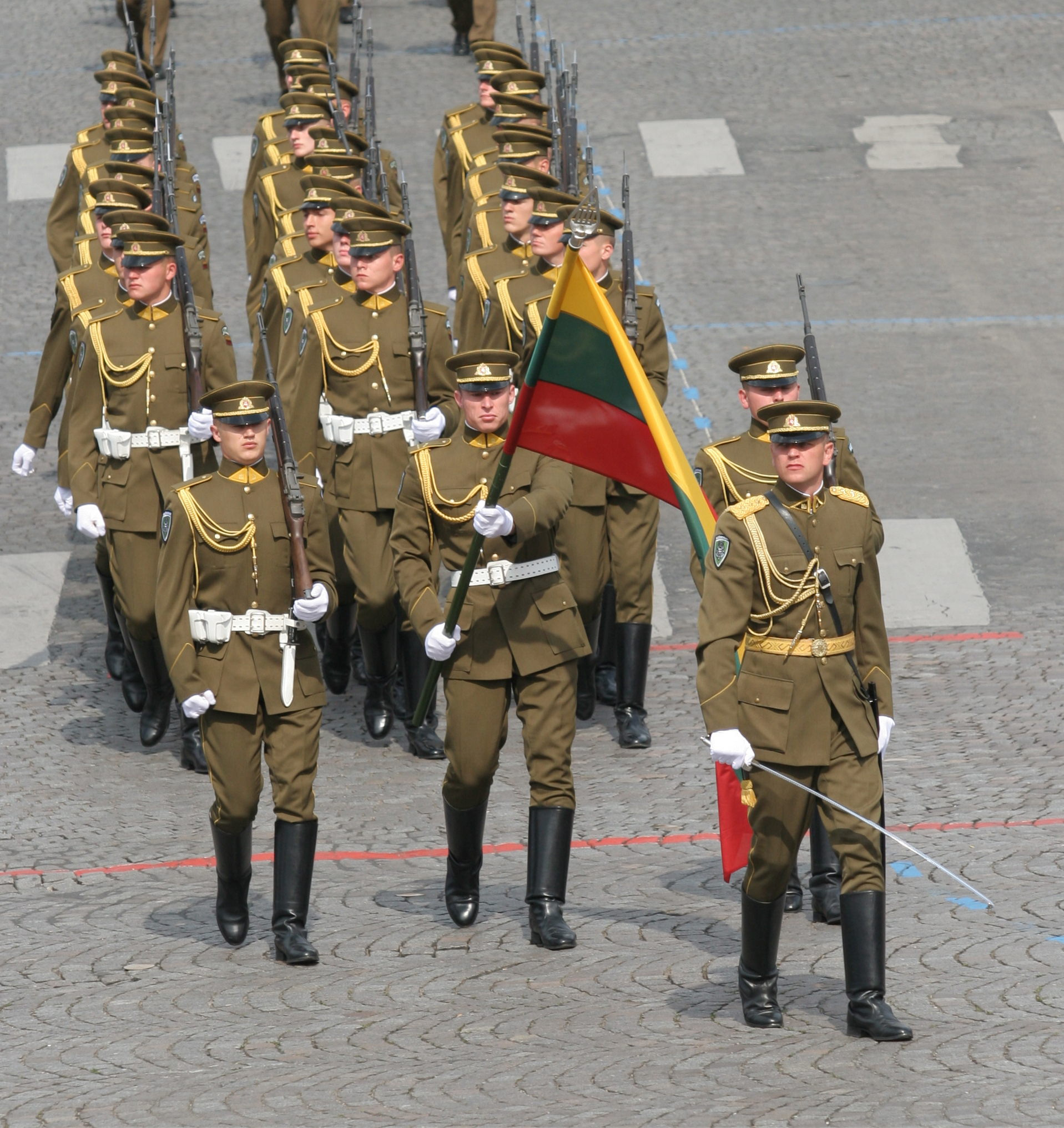 détachement de la compagnie de la garde d'honneur lituanienne cours du défilé du 14 juillet 2007 sur les Champs Elysées à Paris